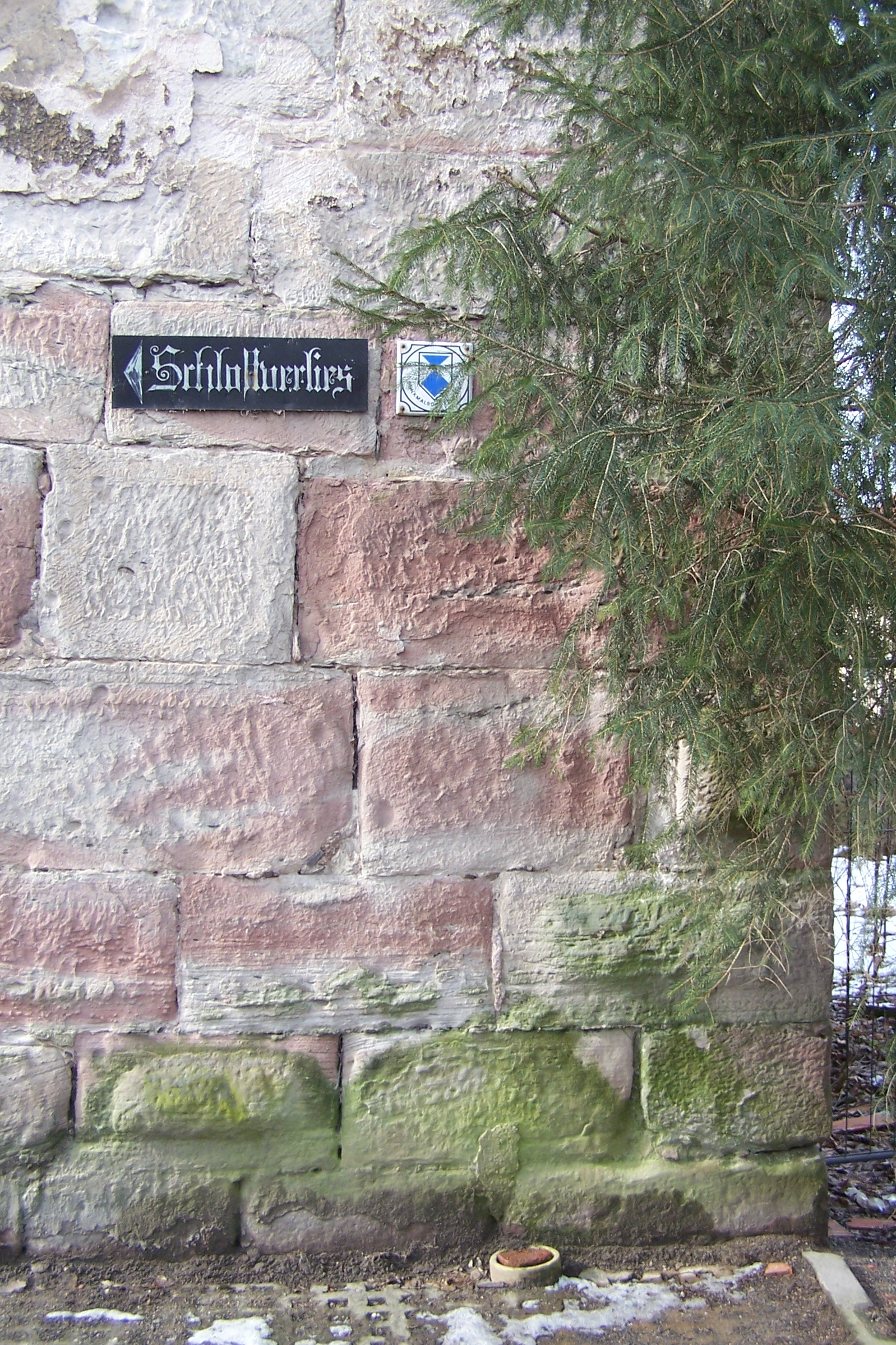 Barchfeld